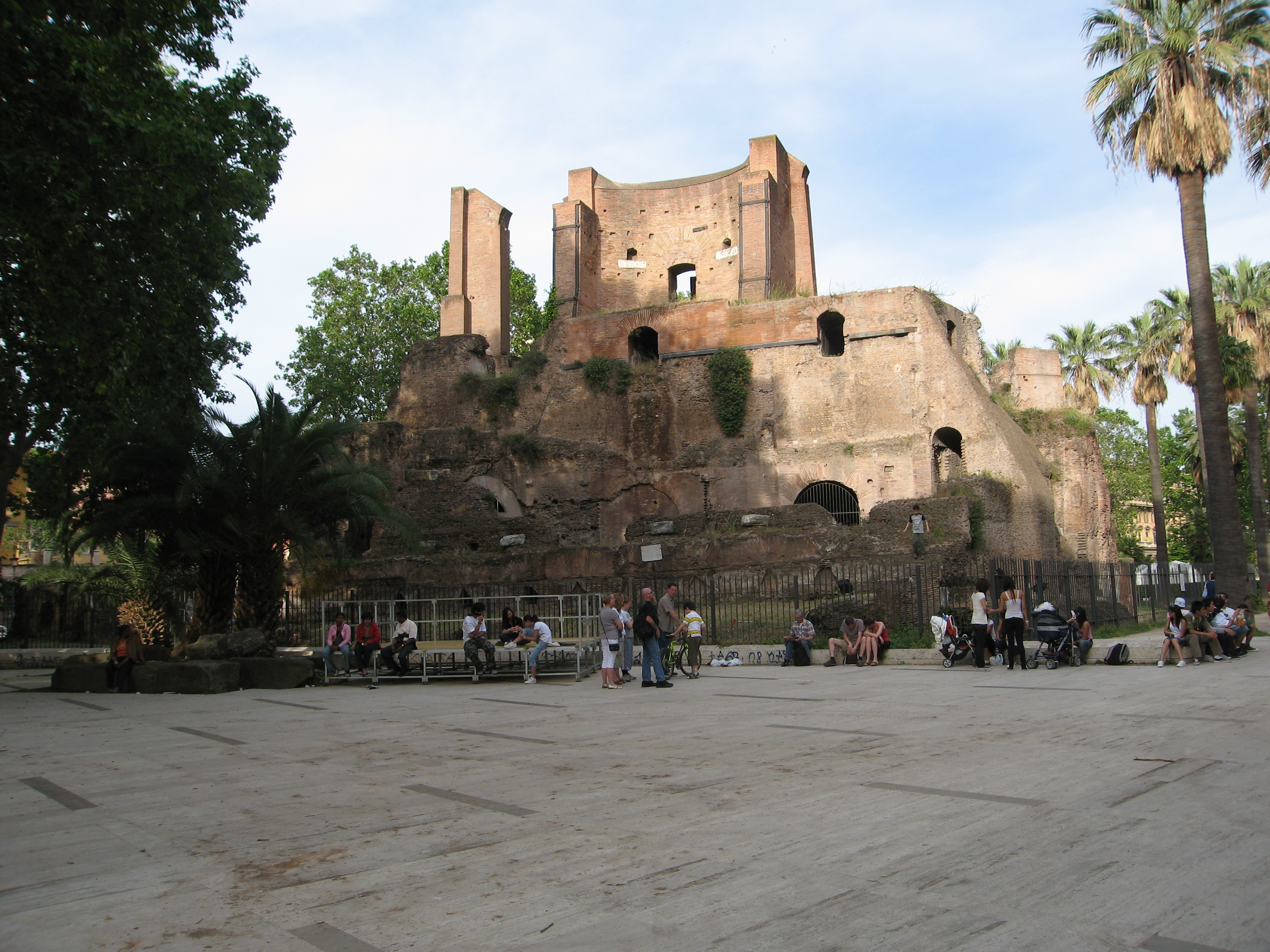 Trofei di Mario, Rione XV Esquilino, Roma, Lazio, Italy